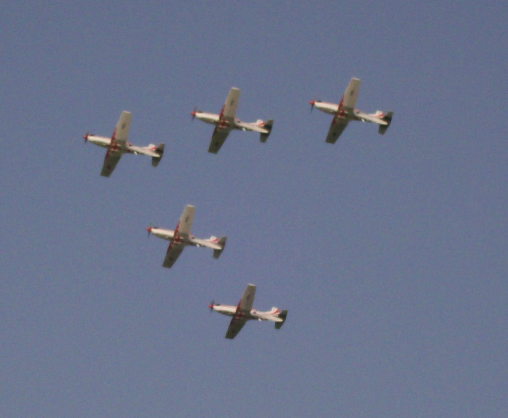 Akrobatska grupa Hrvatskog ratnog zrakoplovstva Krila oluje u Karlovcu